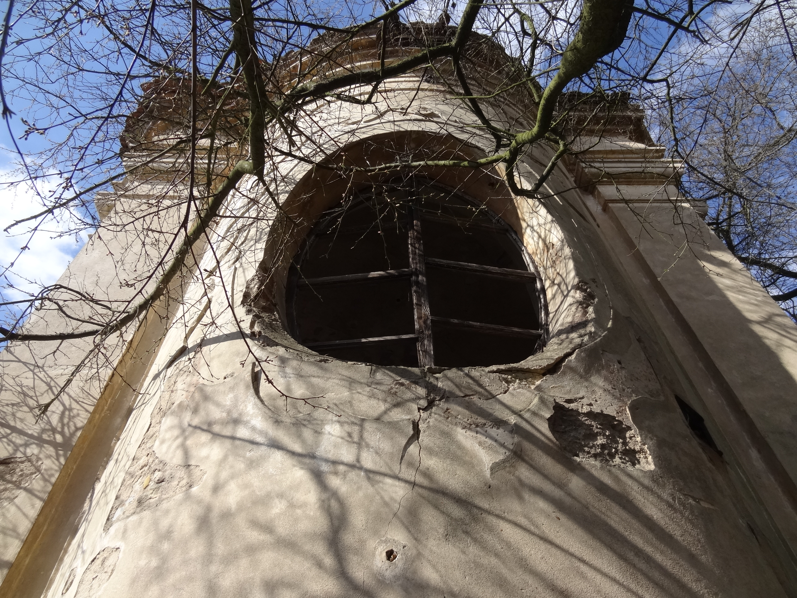 Velký Koráb - viniční dům s kaplí: patrový zděný viniční dům obdélného půdorysu, krytý sedlovou střechou. K jižnímu průčelí přiléhá kaple sv. Jana Nepomuckého se sakristií s bohatě členěným portálem a sochařskou výzdobou, krytá nízkou stanovou střechou. Areál je původně barokní z roku 1728, přestavěn v roce 1894. V současnosti (2017) v havarijním stavu. Lokalita: Nad Tůní 3096/8, Mělník-Vehlovice, Vehlovice.